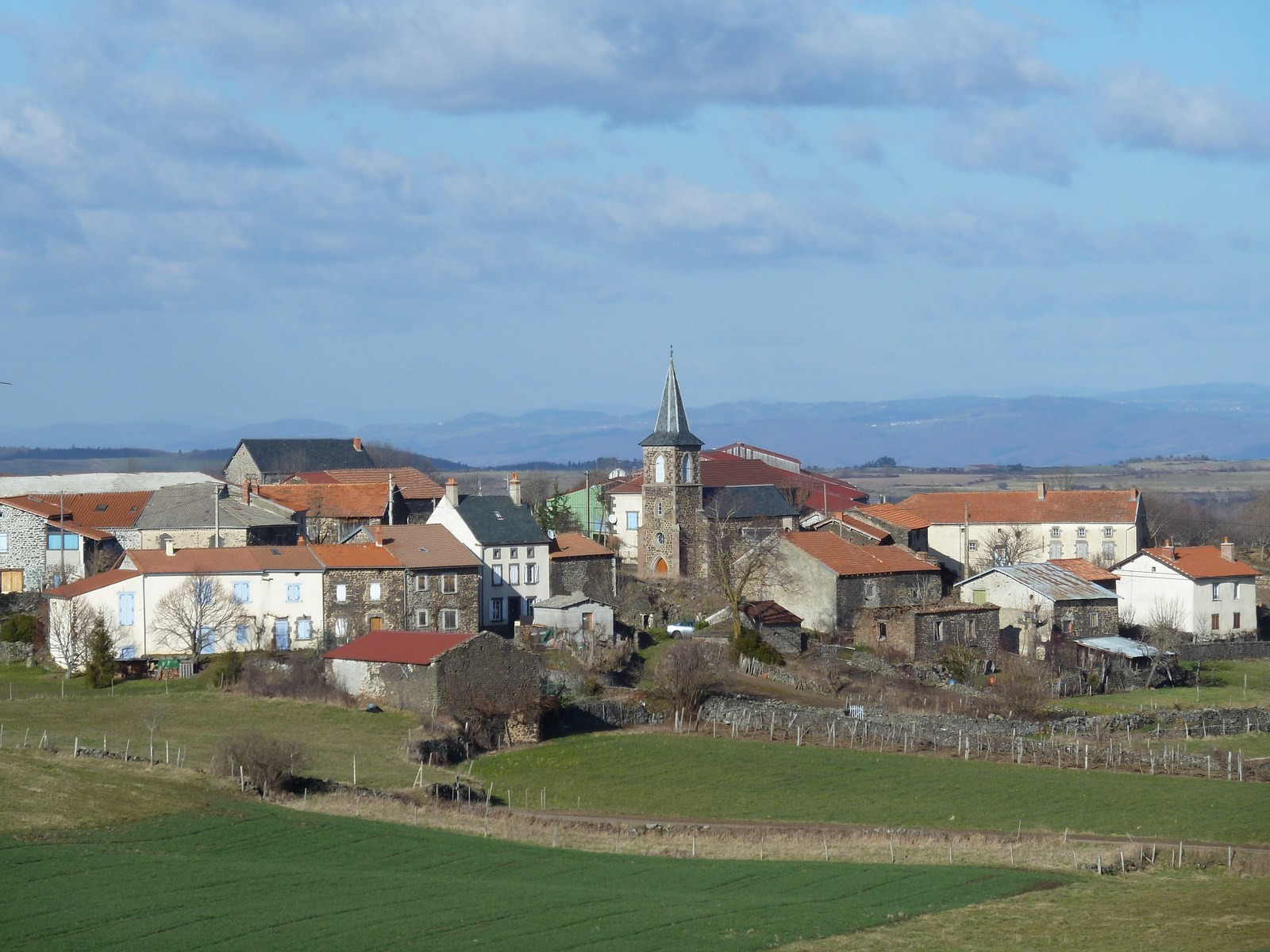 Village de Bussac, commune de Massiac - Cantal -France